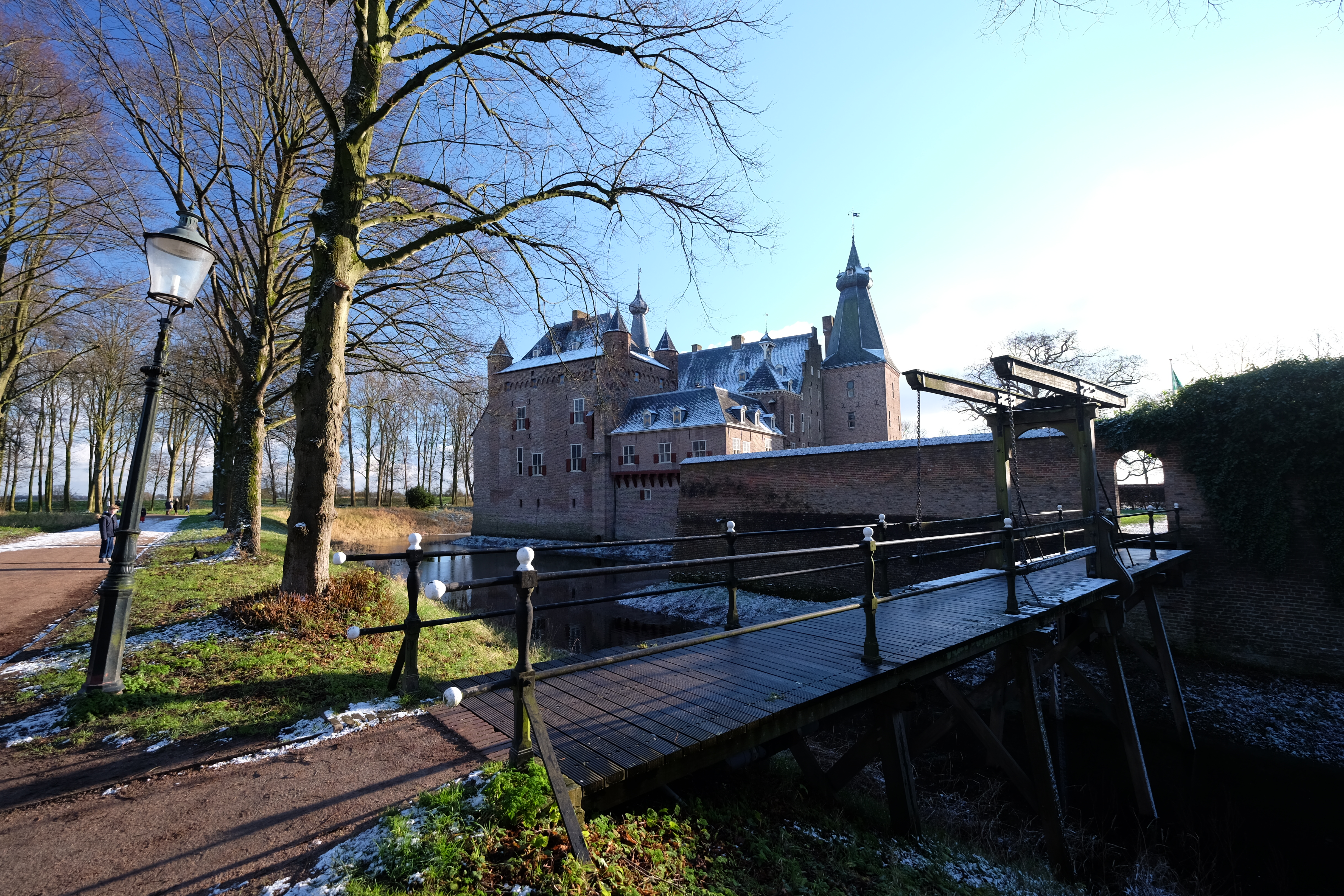 6866 Heelsum, Netherlands